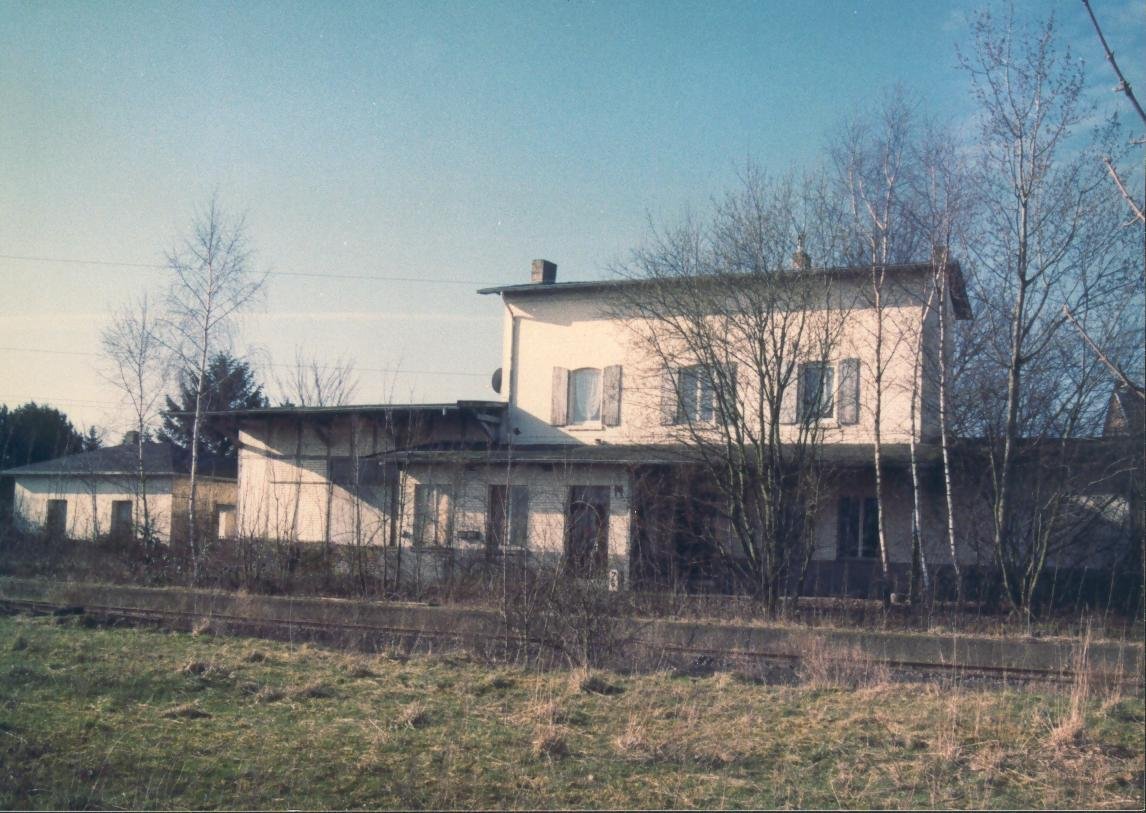 Der ehemalige Bahnhof Bubenheim der Bördebahn.